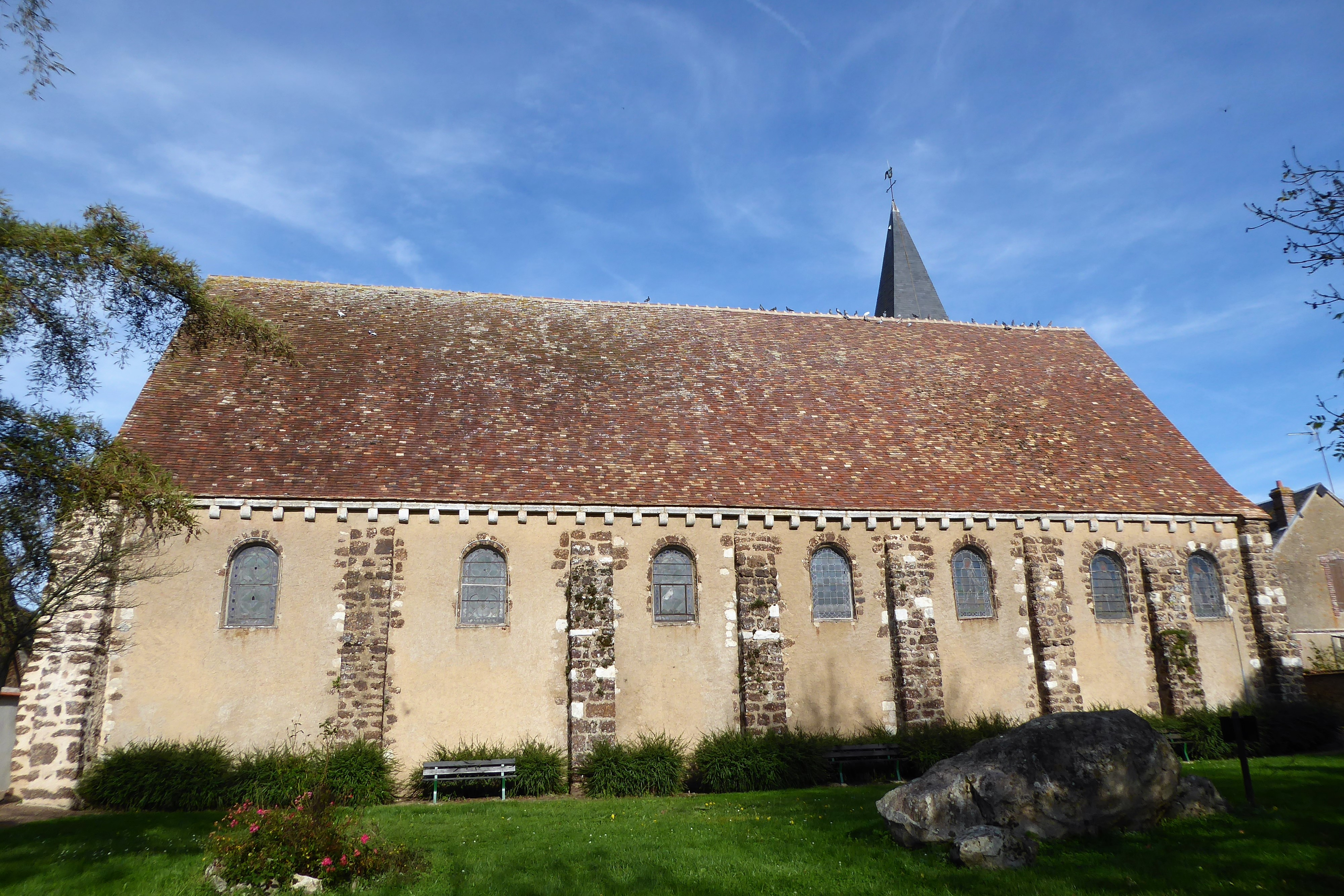 église Saint-Jean-Baptiste, Saumeray, Eure-et-Loir, France.